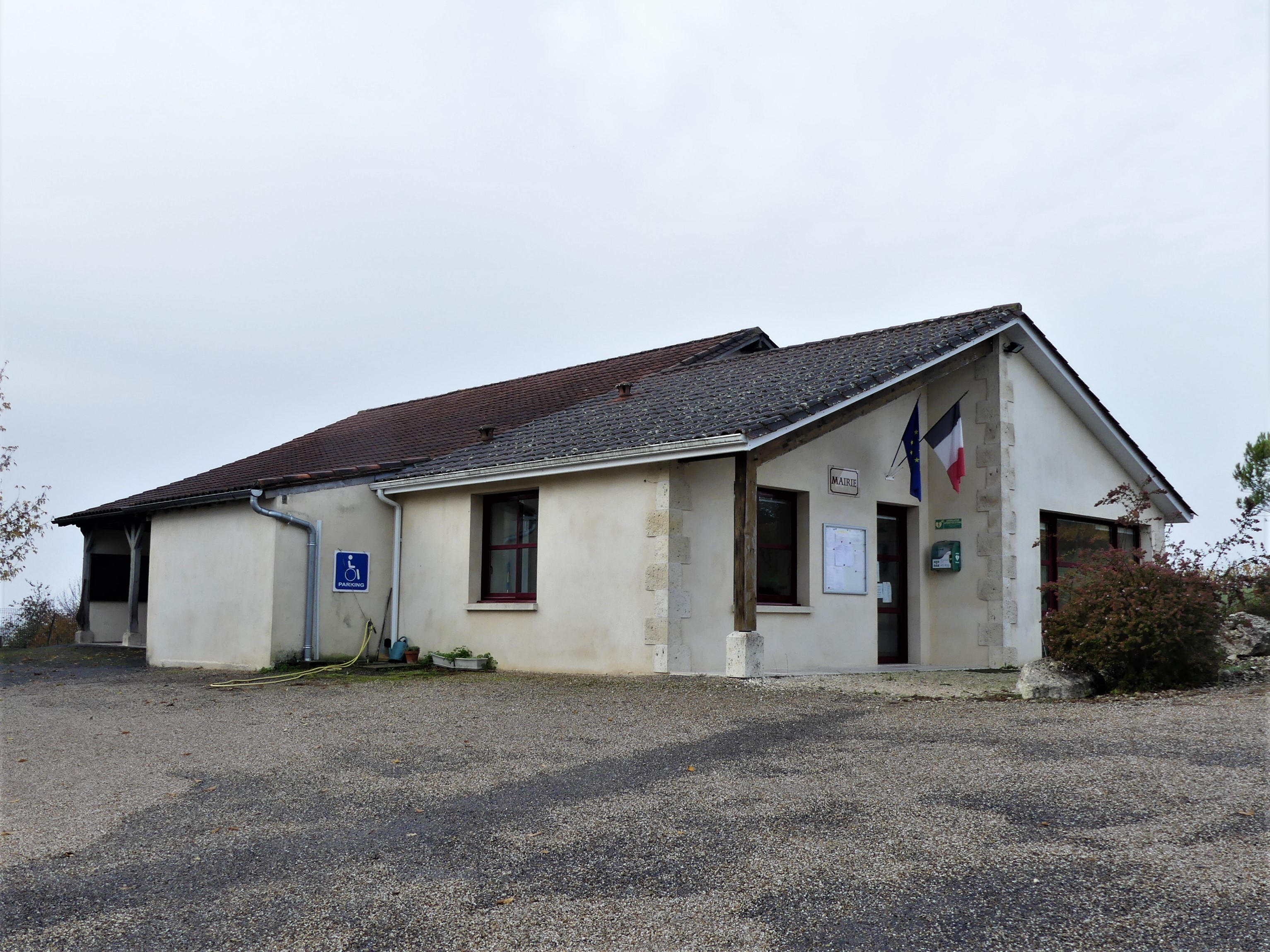 La mairie de Saint-Julien-d'Eymet, Dordogne, France.